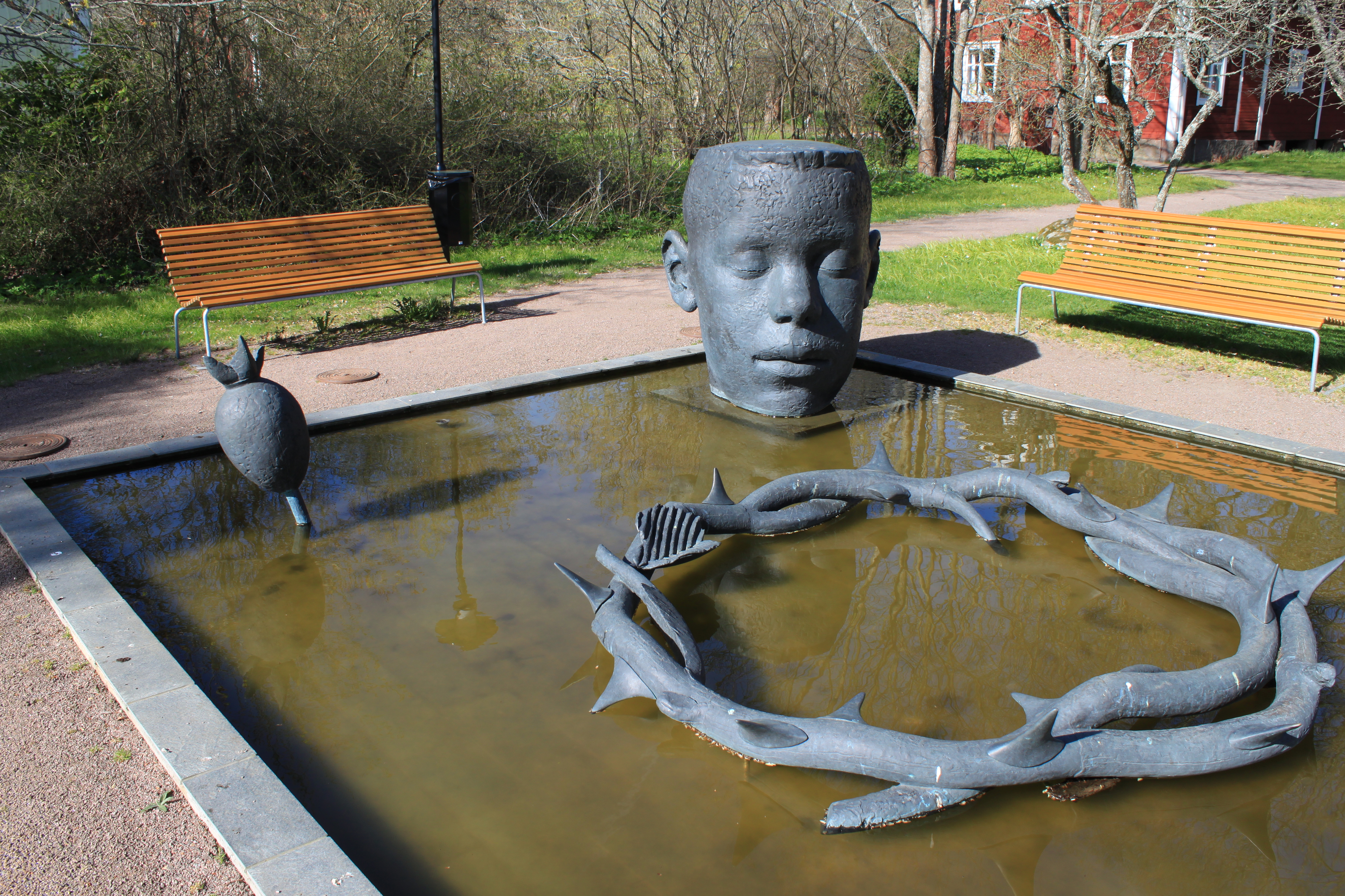 Vimmerby. Skulpturen Källa Astrid av Berit Lindfeldt vid Astrid Lindgrens födelsehus